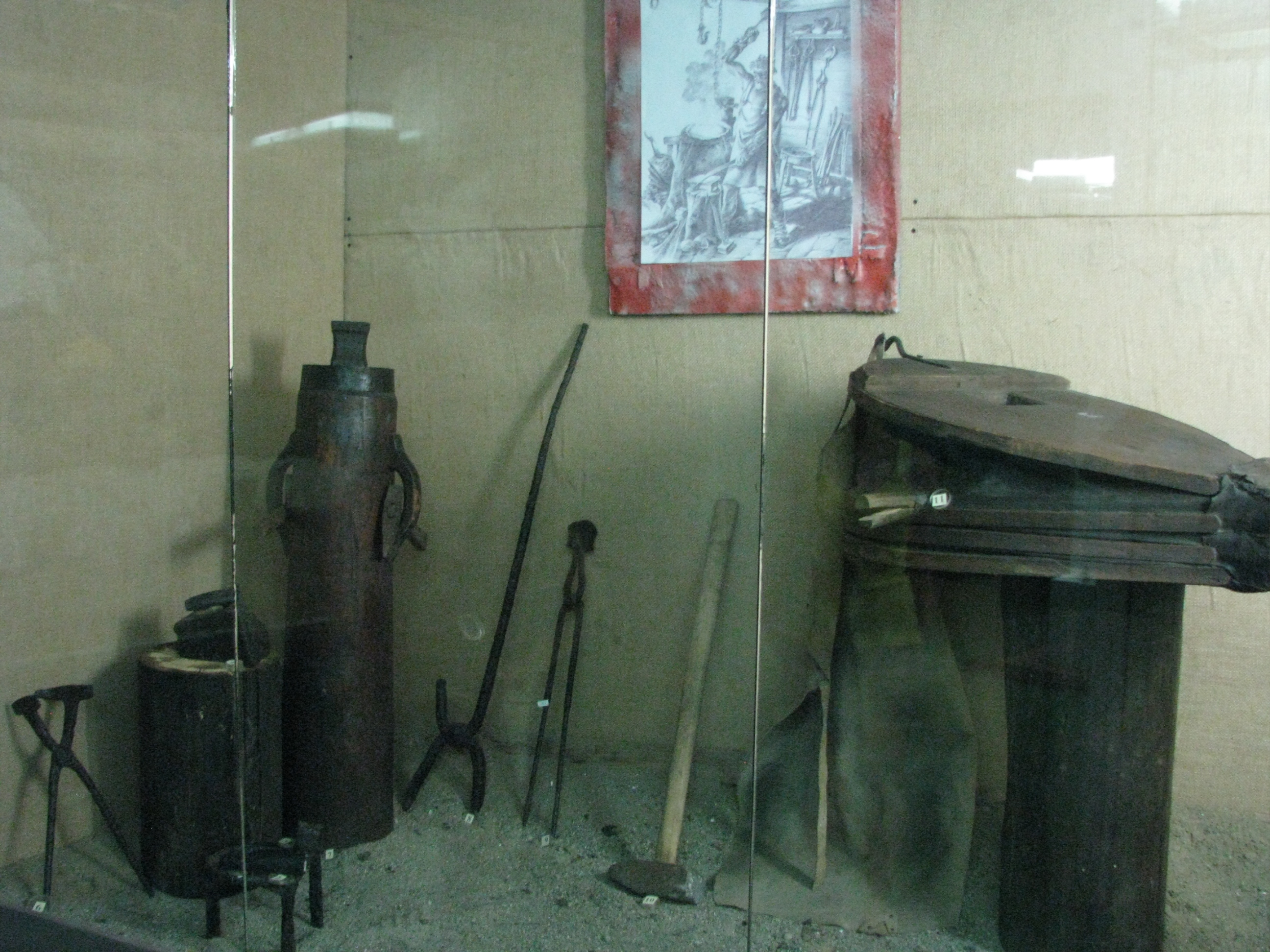 Orăştie Ethnography Museum 2011